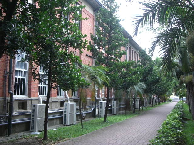 高雄中學二棟